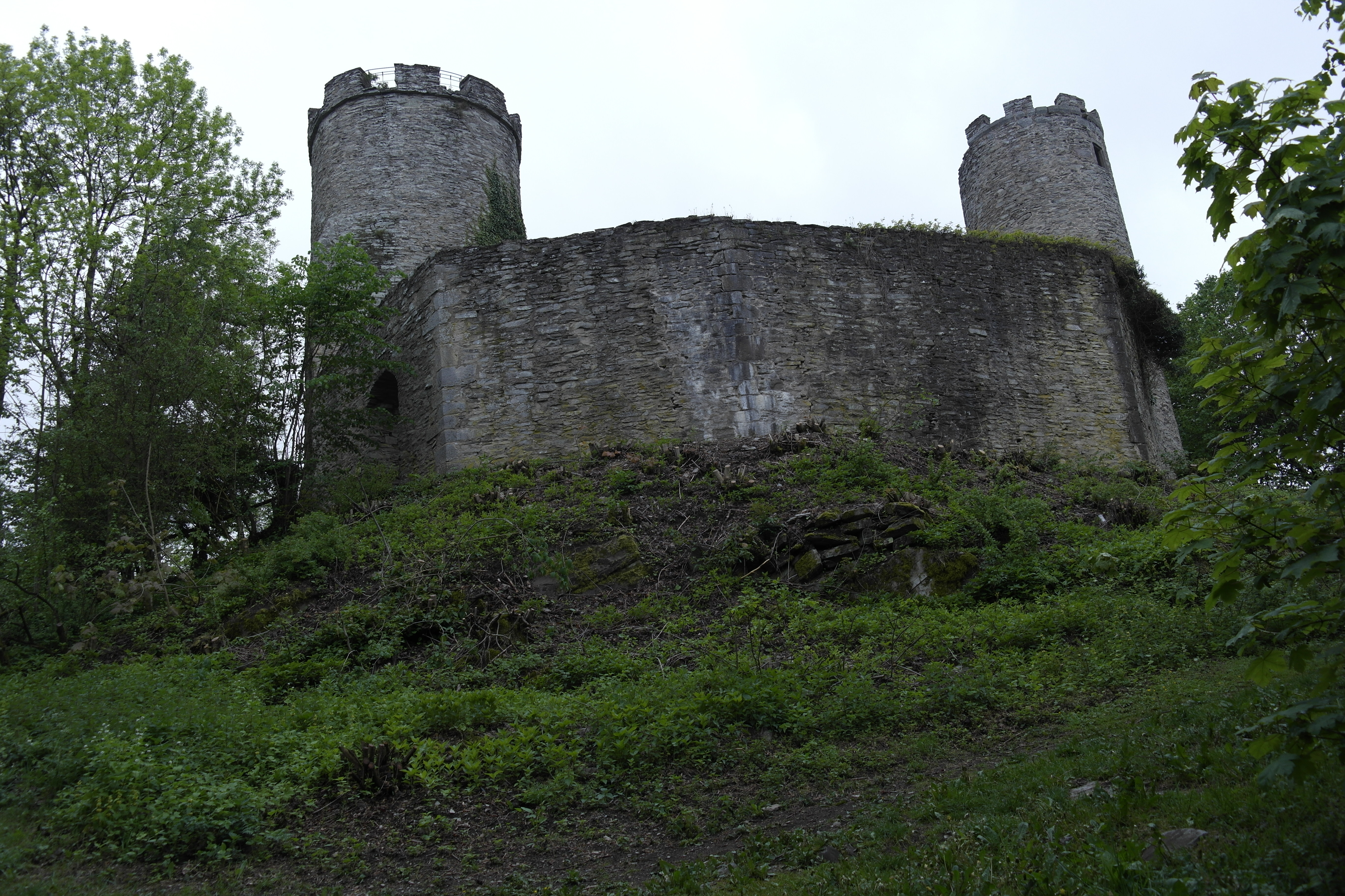 (LSG:HE-2631001)_Hessische Rhön, Hessische Rhön-Ebersberg (689m) mit Burgruine Ebersburg